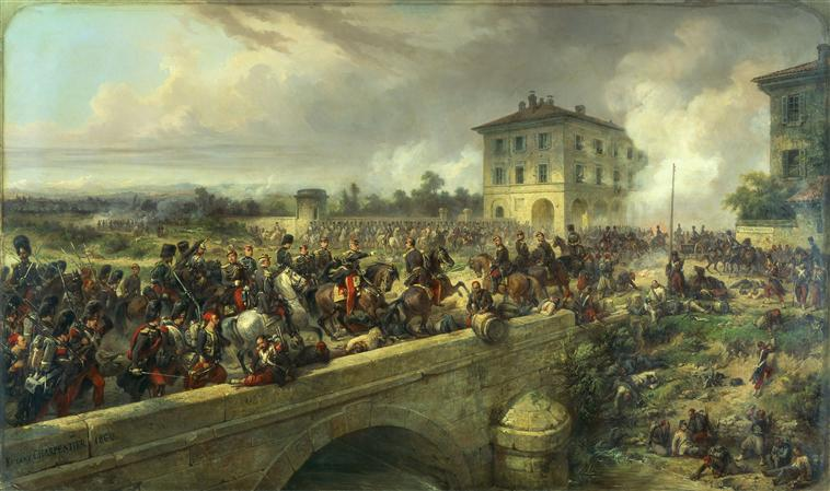 La Garde impériale à Magenta par Charpentier